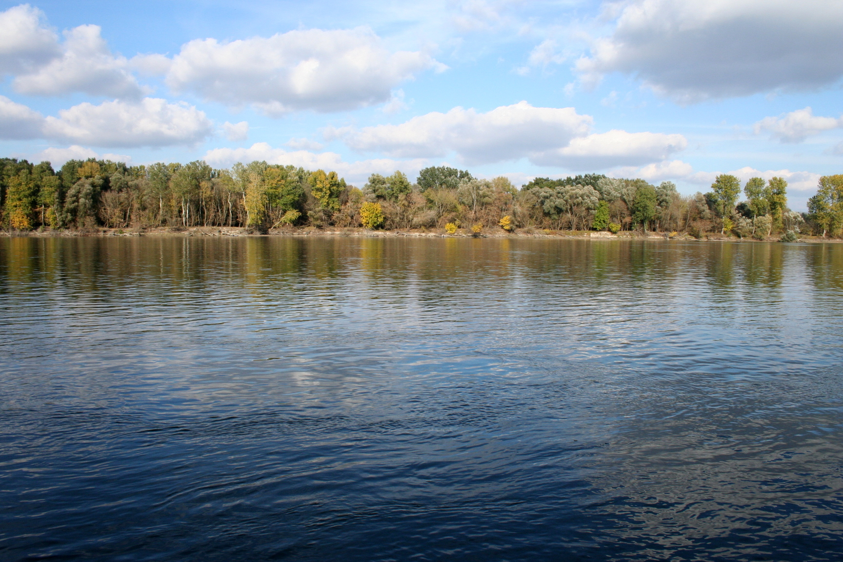 Mohovski kanal